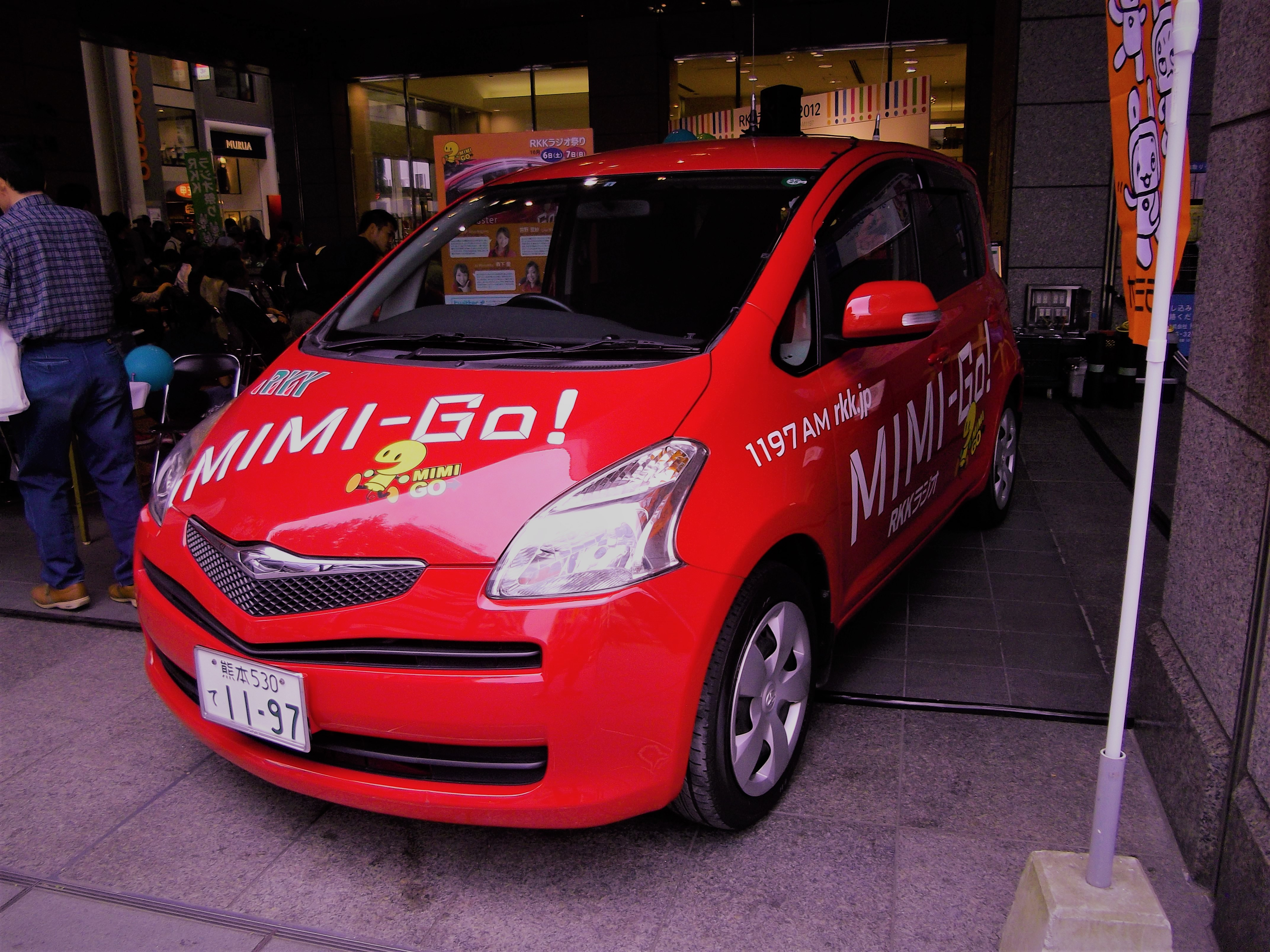 熊本放送のラジオカー、ミミー1